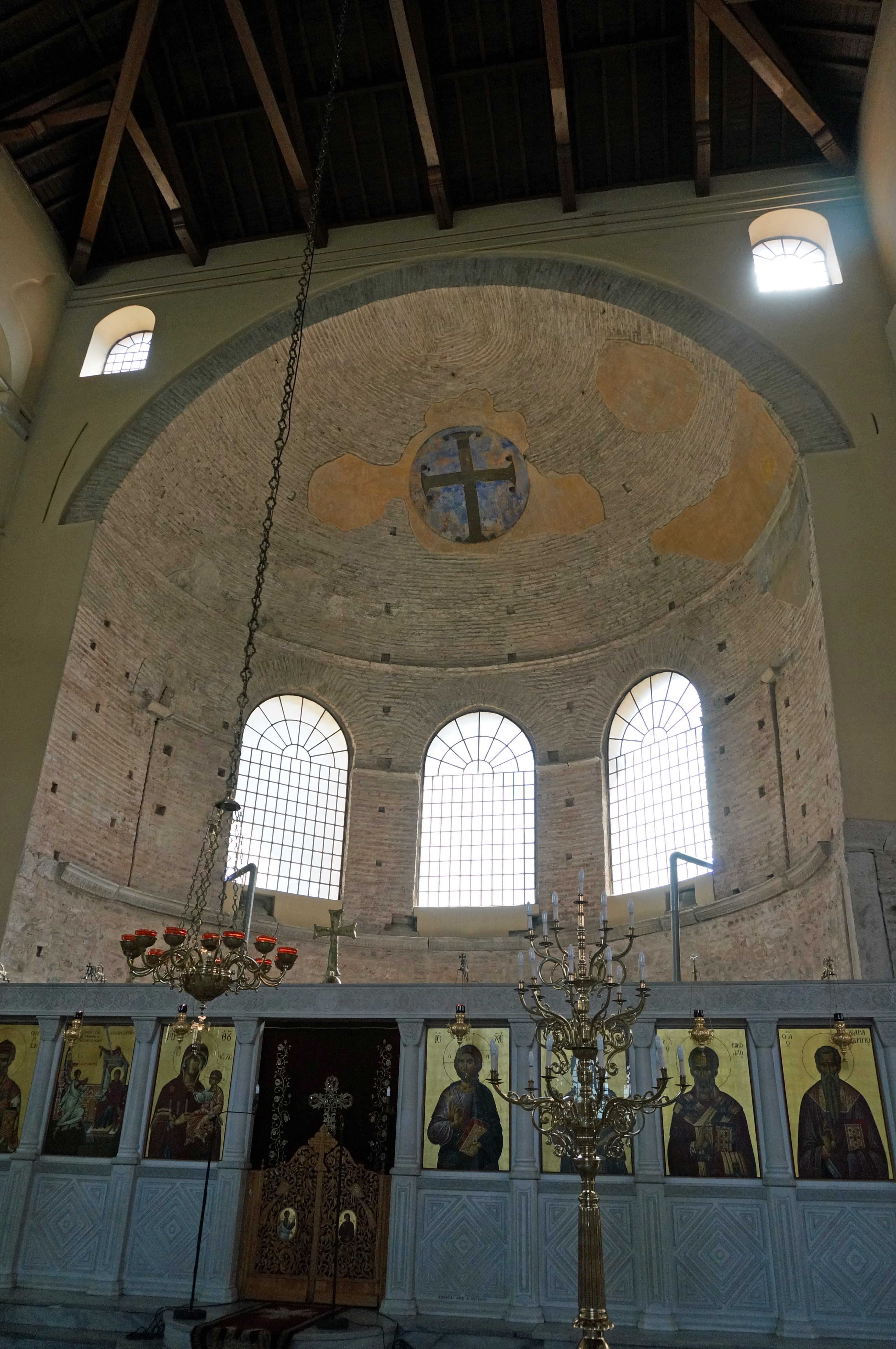 vue de l'église Acheiropoietos .